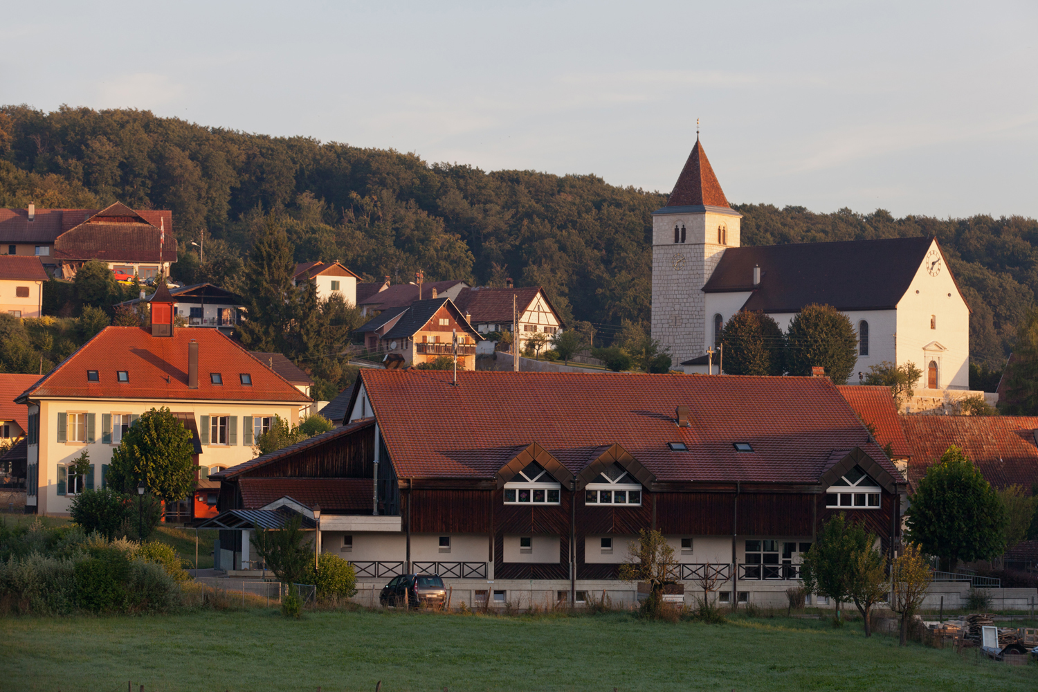 Coeuve (JU), ecole, salle de gymnastique, église